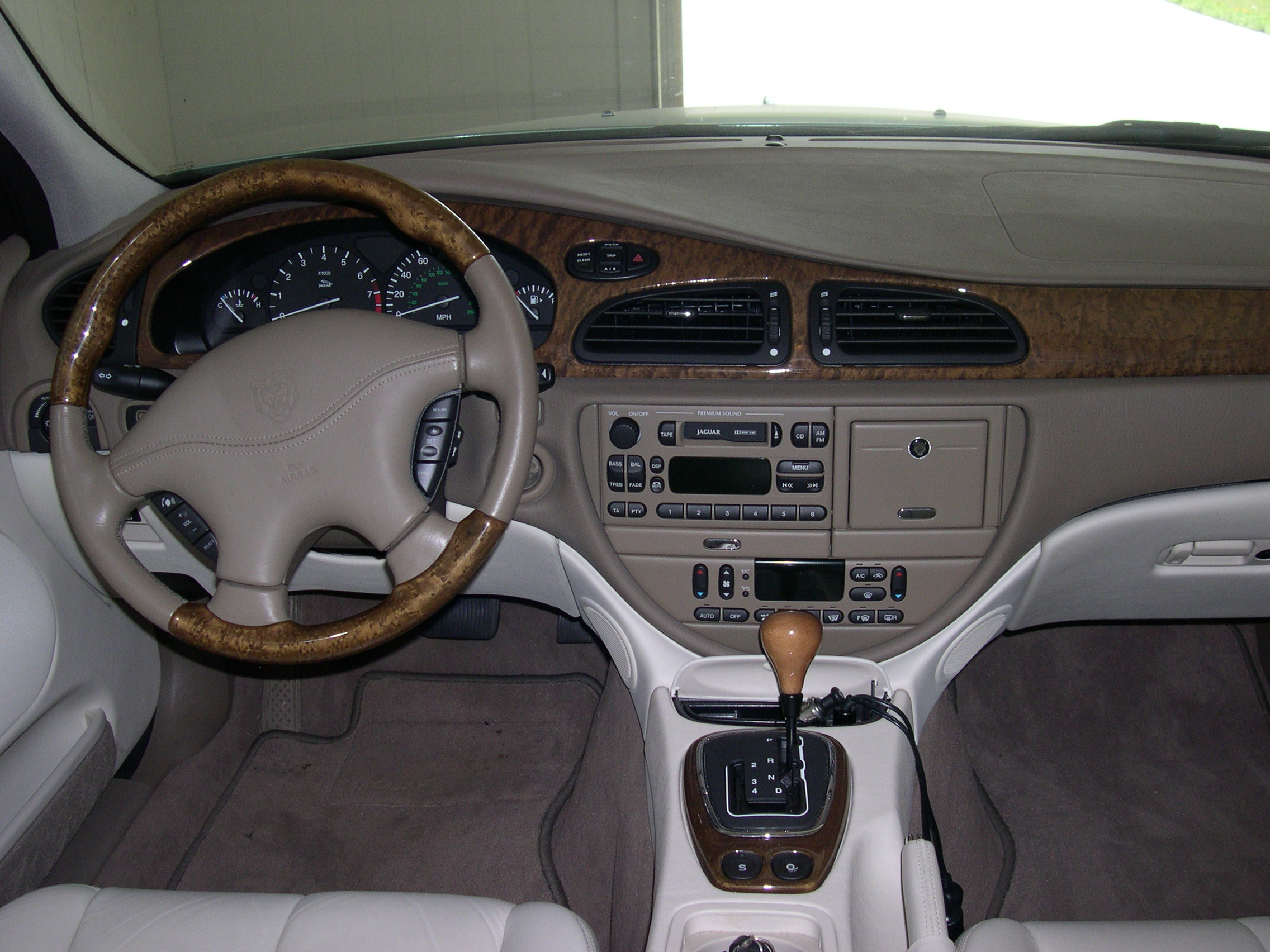 2001 Jaguar S-Type